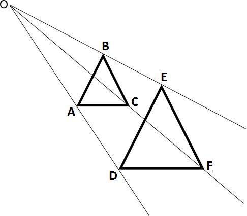 desen pentru teorema lui Desargues